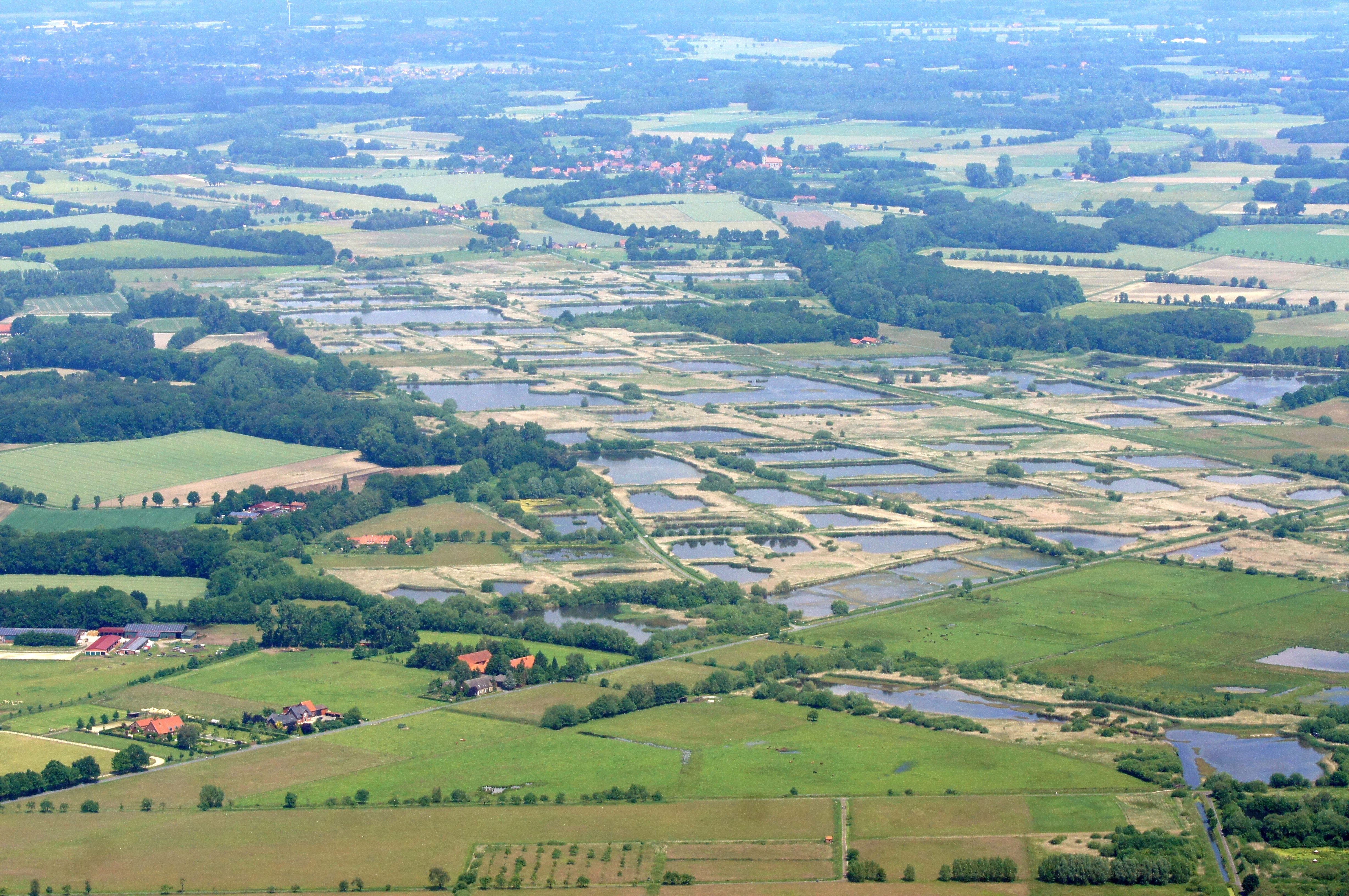 Die Rieselfelder, ein Naturschutzgebiet im Norden von Münster, Nordrhein-Westfalen, Deutschland. Das Foto entstand während des Münsterland-Fotoflugs am 1. Juni 2014. Hinweis: Die Aufnahme wurde aus dem Flugzeug durch eine Glasscheibe hindurch fotografiert.